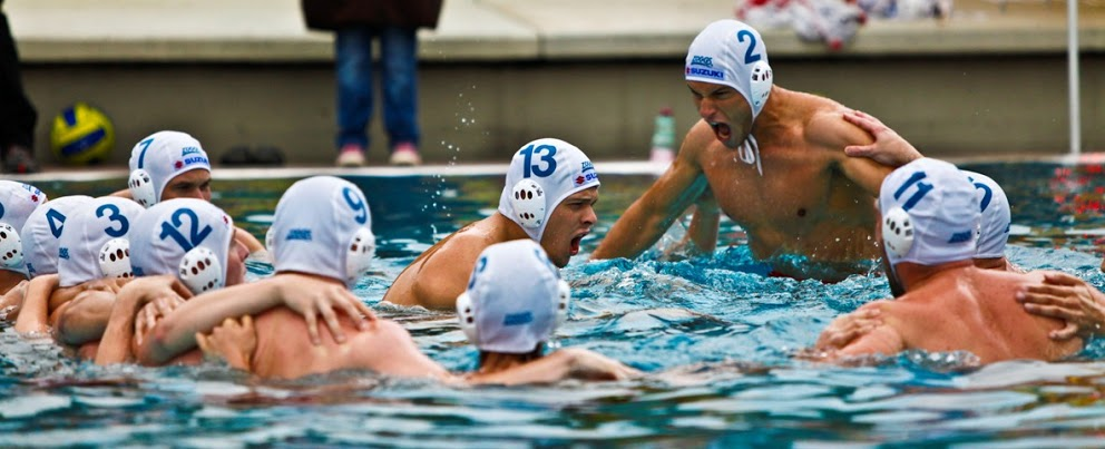 Mannschaft von PL Salzburg vor dem Spiel